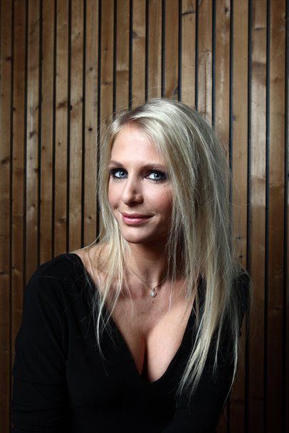 Annelien Coorevits